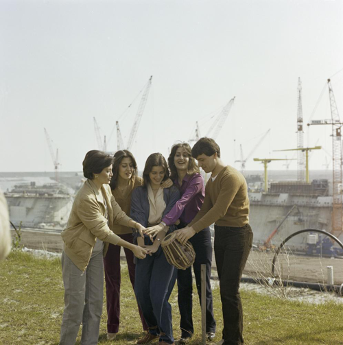 De Turkse zangeres Ajda Pekkan en haar groep tijdens een fotosessie voor het Eurovisie Songfestival 1980